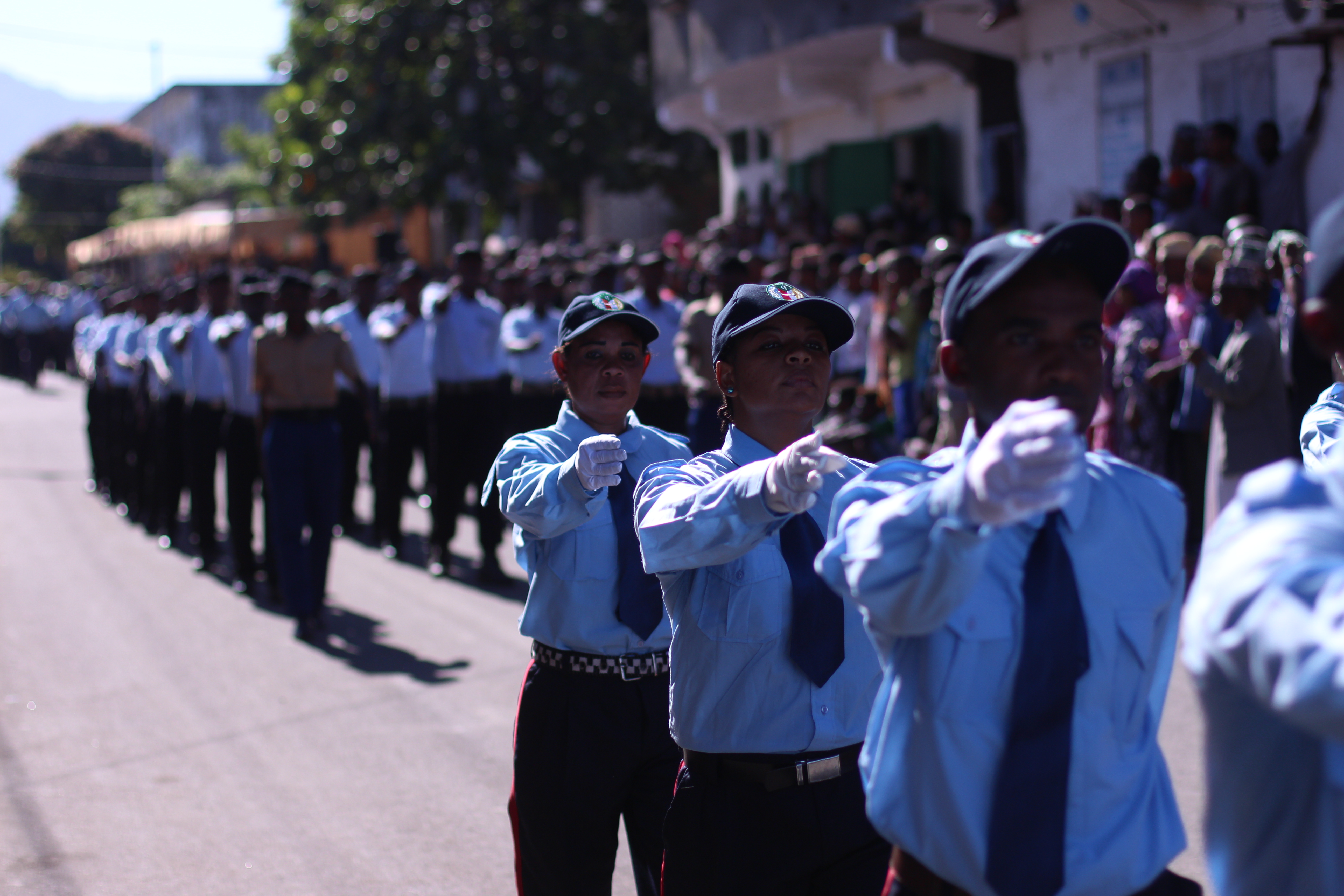 Unabhängigkeitsparade in Mutsamudu auf der Insel Anjouan, Komoren. Anlässlich des Feiertags wurde eine Militär und Polizei Parade durchgeführt. This is an image of "African people at work" from Comoros